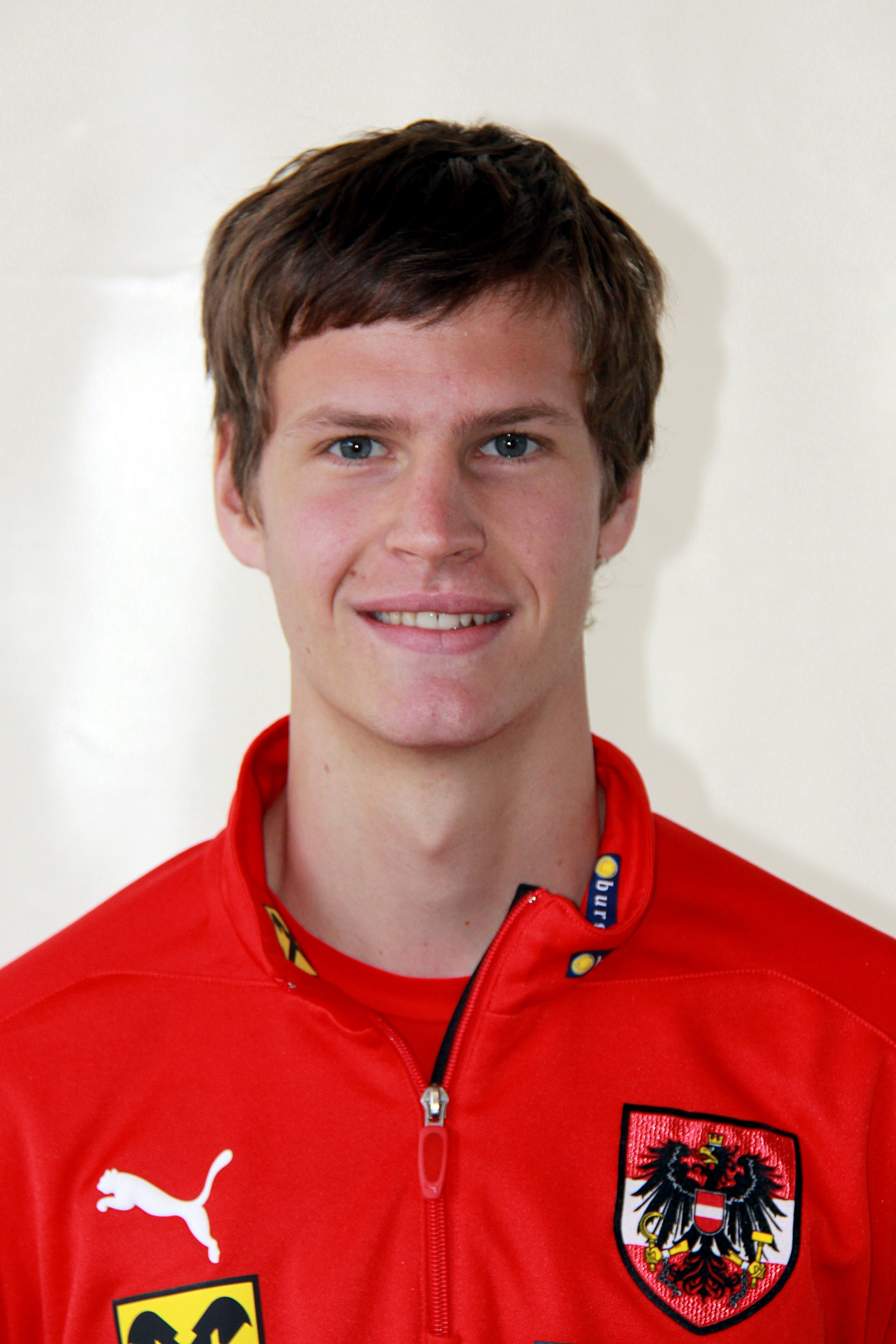 Georg Gravogl (SKN St. Pölten) - Österreichische Fußballnationalmannschaft (U-21-Männer)